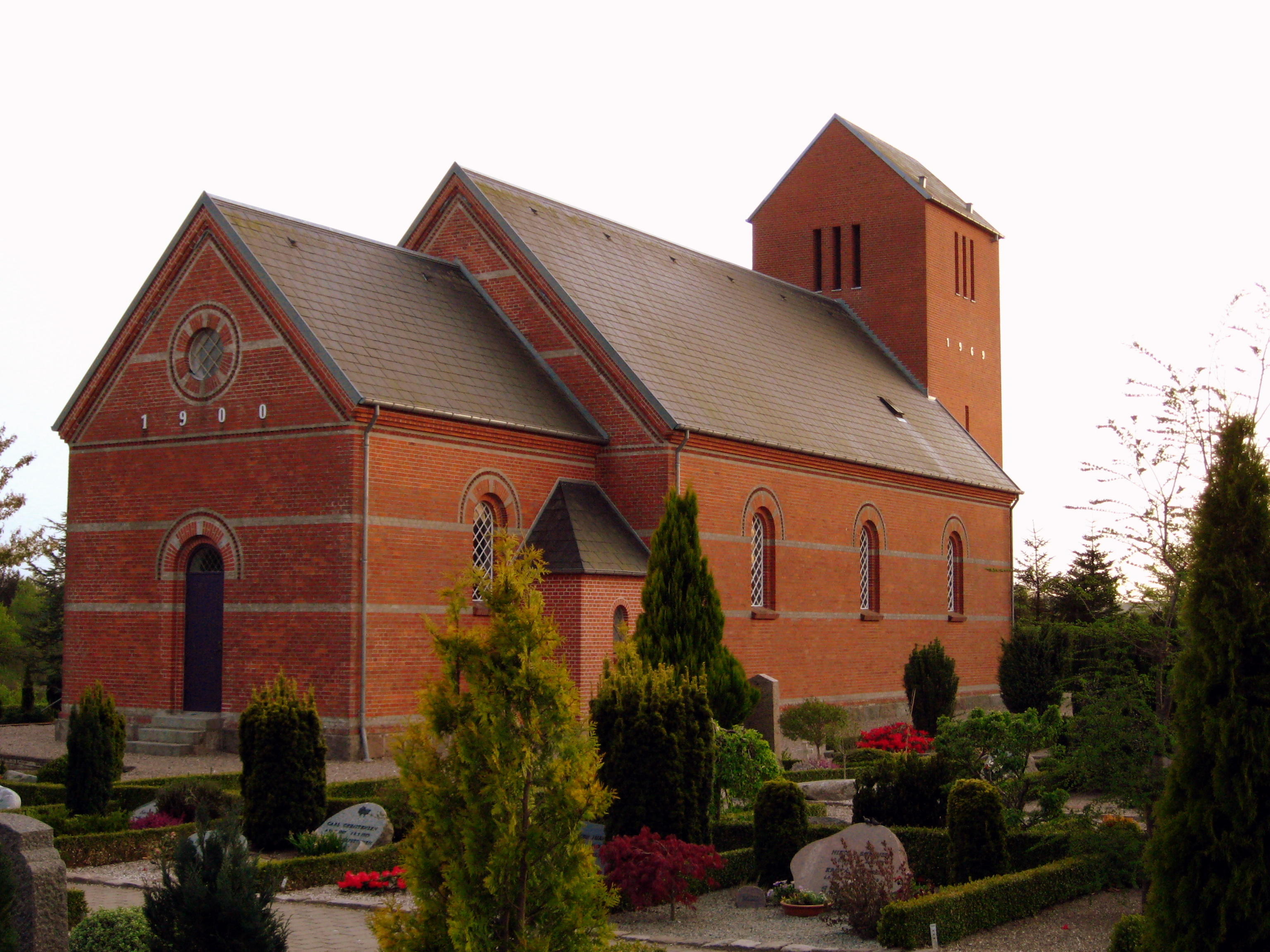 Østervrå Kirke, Frederikshavn Kommune